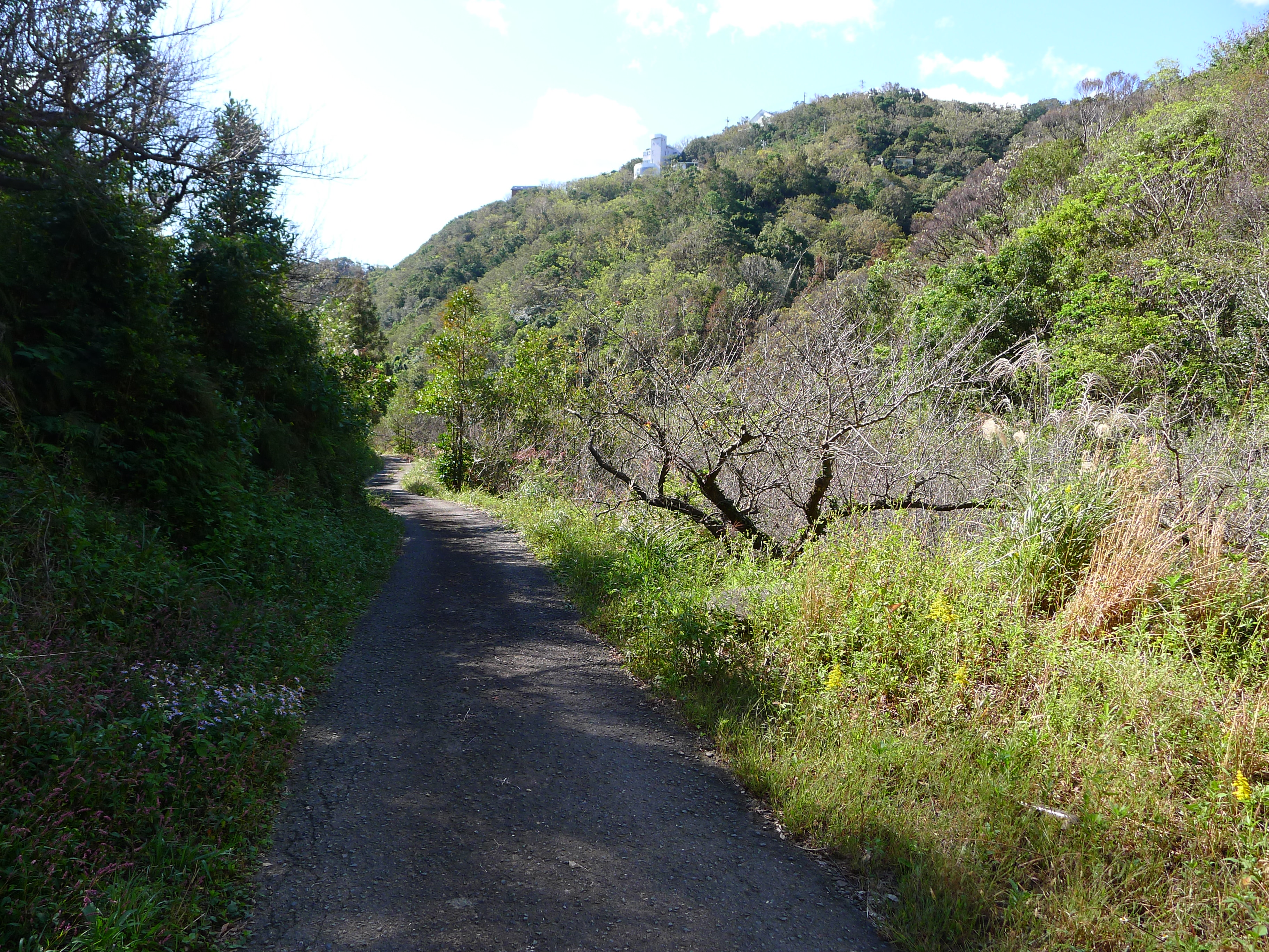 熊野古道紀伊路（和歌山県印南町）